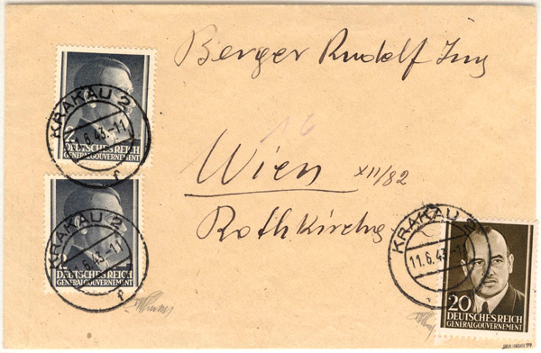 Vom Britischen Geheimdienst PWE gefälschte Marke von Hans Frank auf einem Brief für das von Deutschland besetzte Polen (Generalgouvernement).